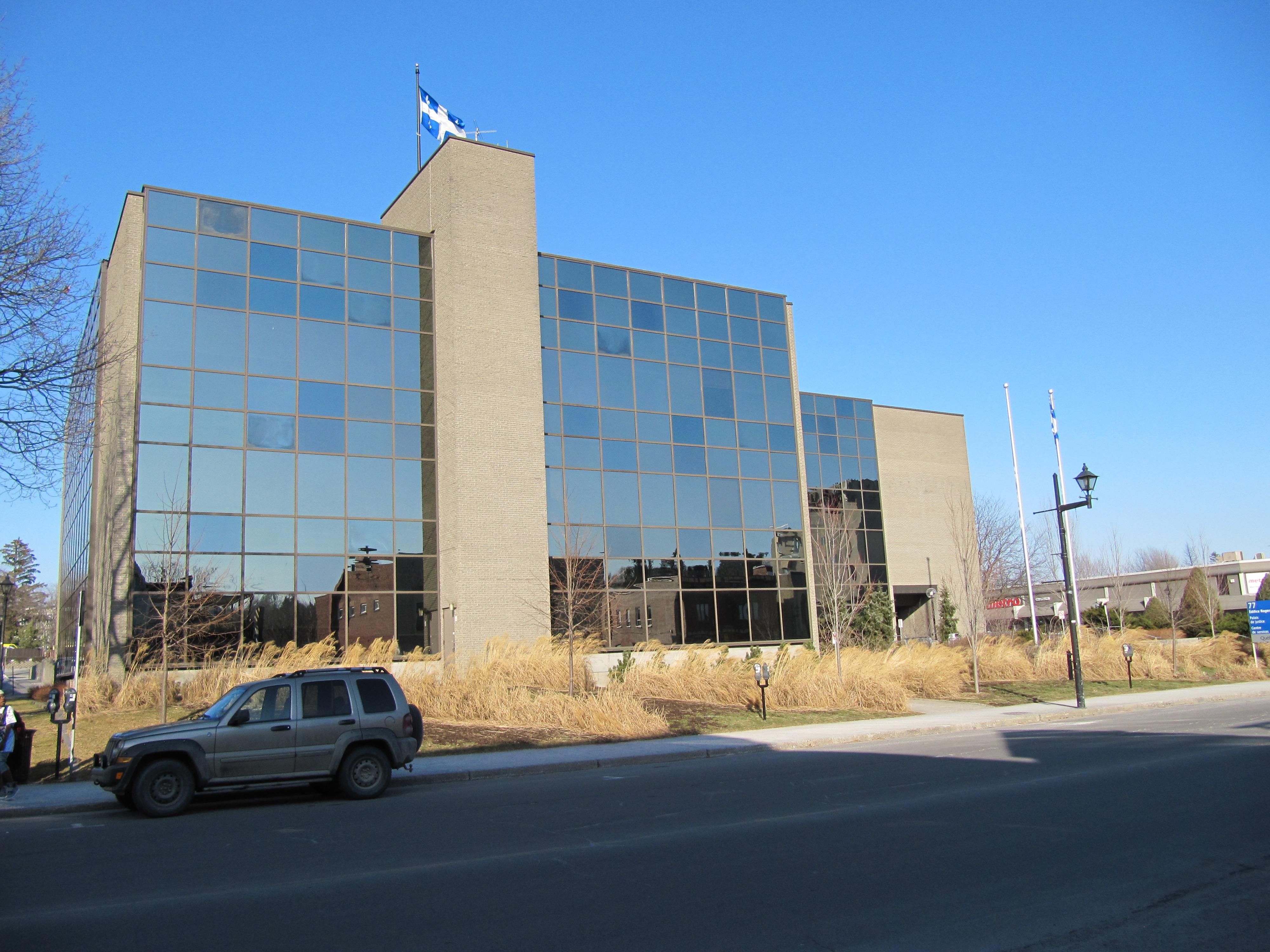 Édifice Roger-Paré de Granby - Palais de justice et centre de service (juridiction provinciale)